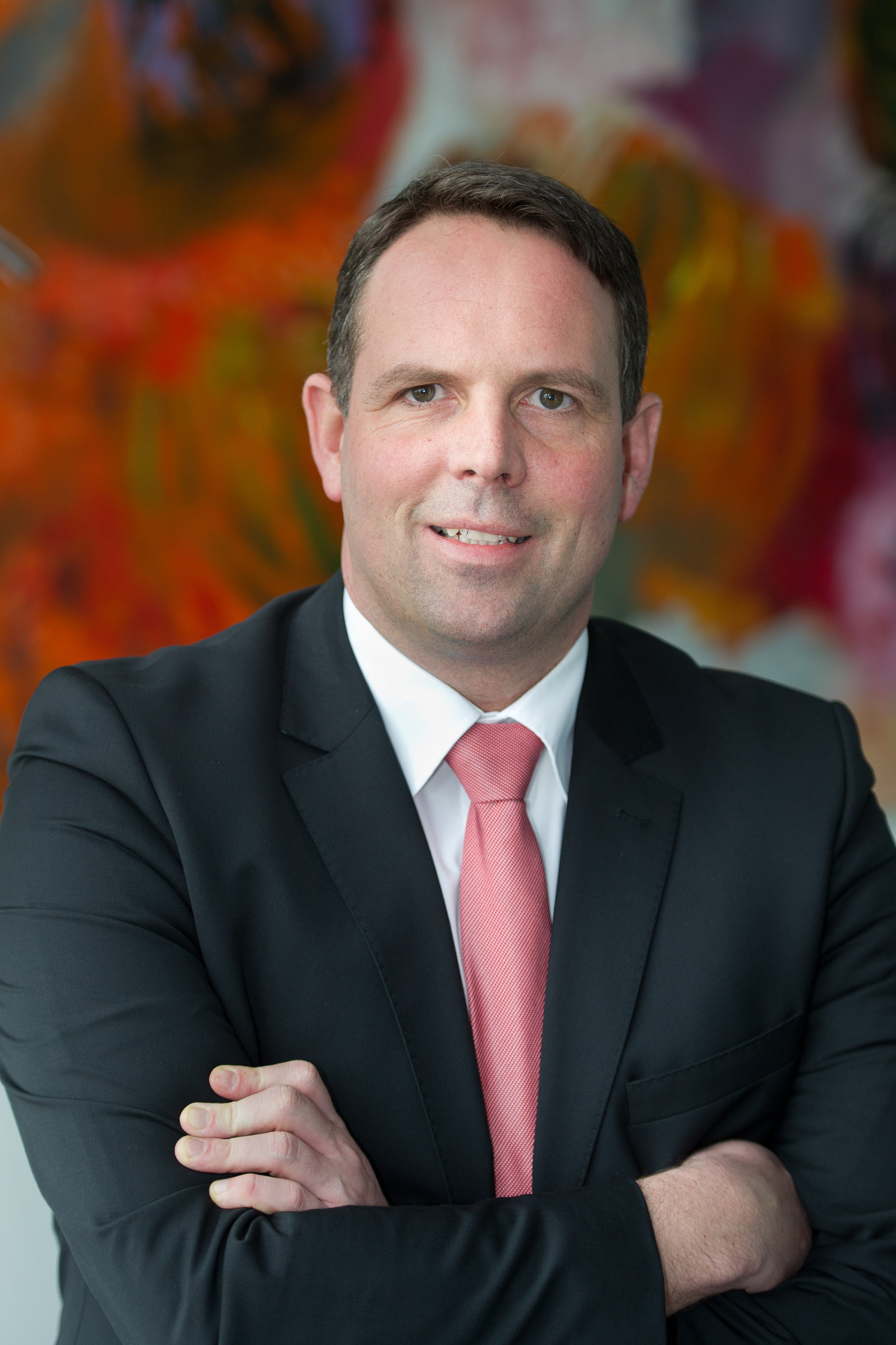 Stephan Kolling ist Staatssekretär im Ministerium für Soziales, Gesundheit, Frauen und Familie des Saarlandes.Foto: Iris Maurer